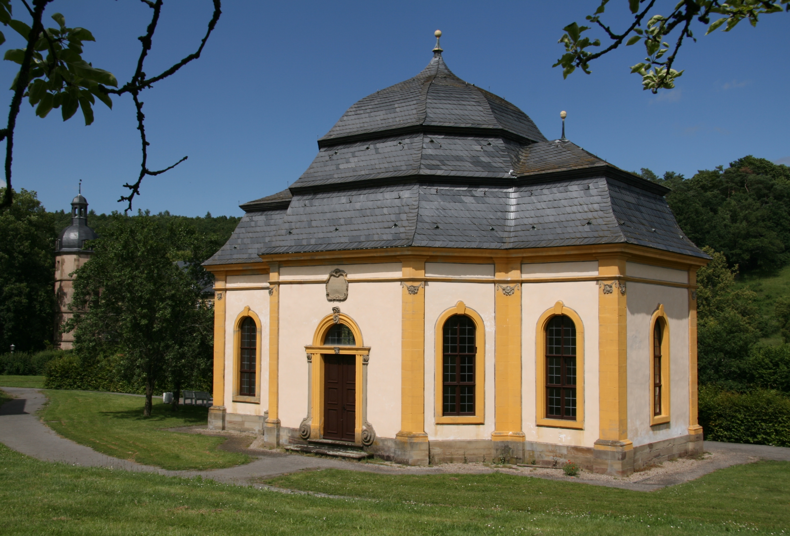 Gartensalett 1765/66 des Abtes Bonifaz Geßner, Kloster Maria Bildhausen